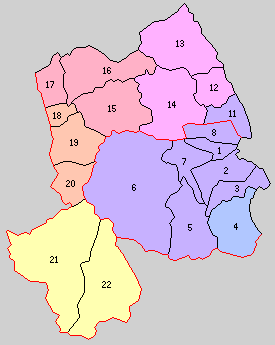 岩手県九戸郡の町村。